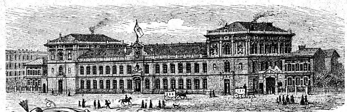 Das kaiserliche Paket- und Zeitungspostamt in Leipzig am Johannisplatz / Prager Straße 4-10, Höhe Grassimuseum, eröffnet am 16. Oktober 1880. Frontansicht des Hauptgebäudes von der Prager, damals Hospitalstraße aus. Stich von Hermann Heubner in "Die Gartenlaube" 1881, S. 411